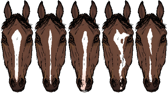 5 different kinds of blaze